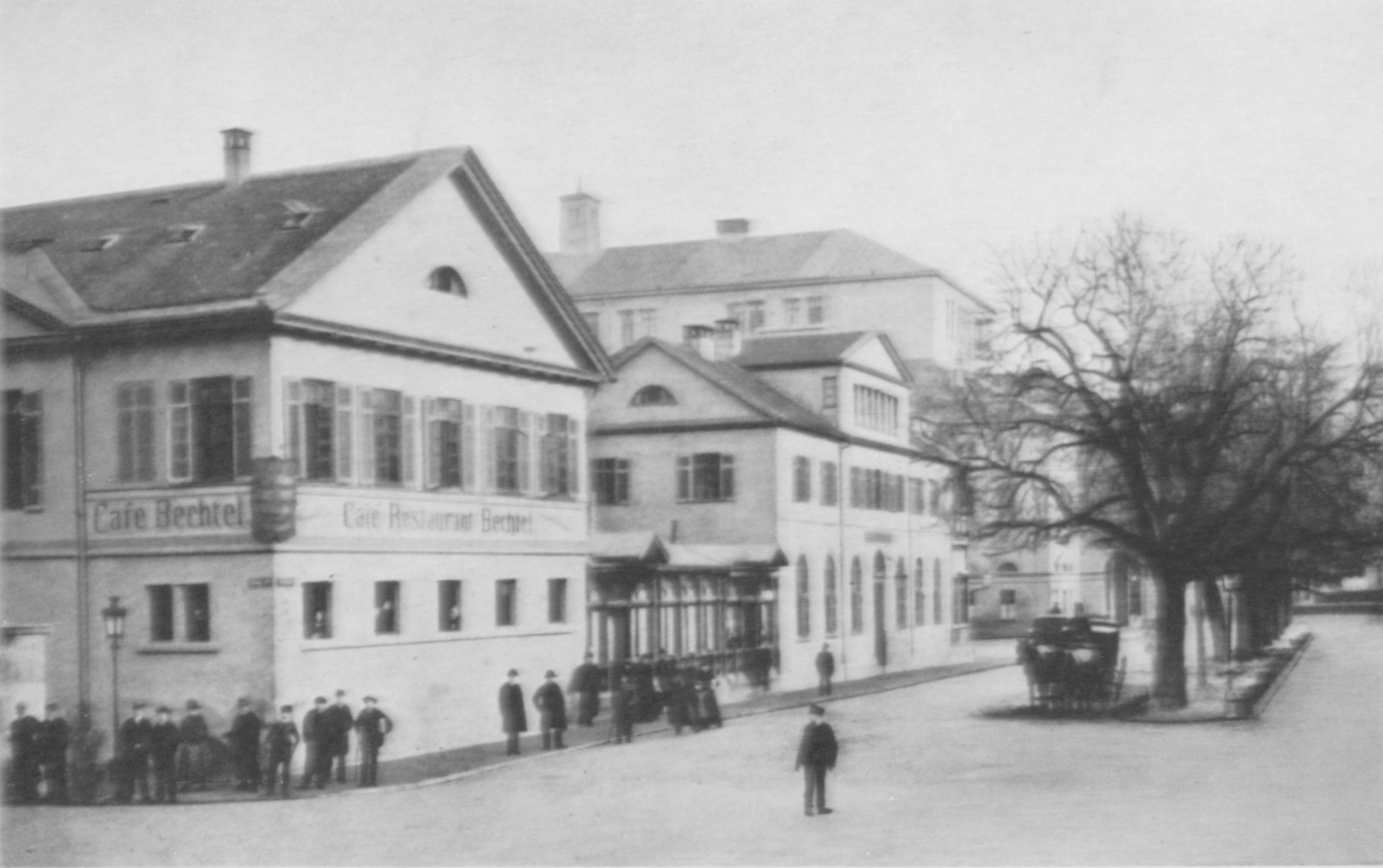 Café Bechtel, das frühere Café Marquardt, bestehend aus dem Vellnagelschen Haus an der Ecke der Königstraße zur Schlossstraße (heute Bolzstraße), einem Garten und der Danneckerei, rechts der Schlossplatz, hinten das Hoftheater, 1886.